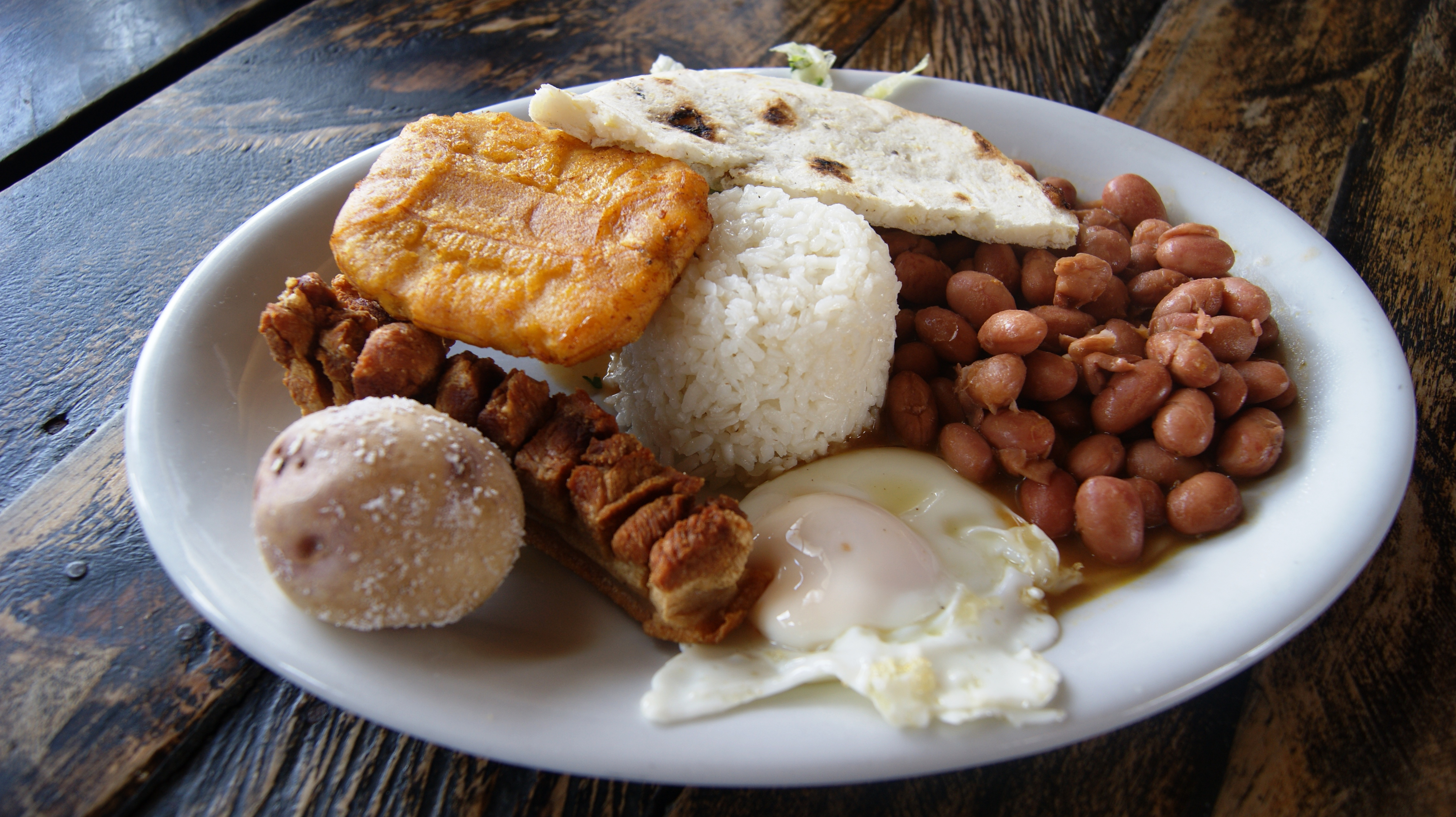 Bandeja paisa, servido en el Peñón de Guatapé. Antioquia- Colombia.